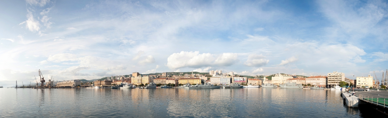 Dan HRM-a, Rijeka